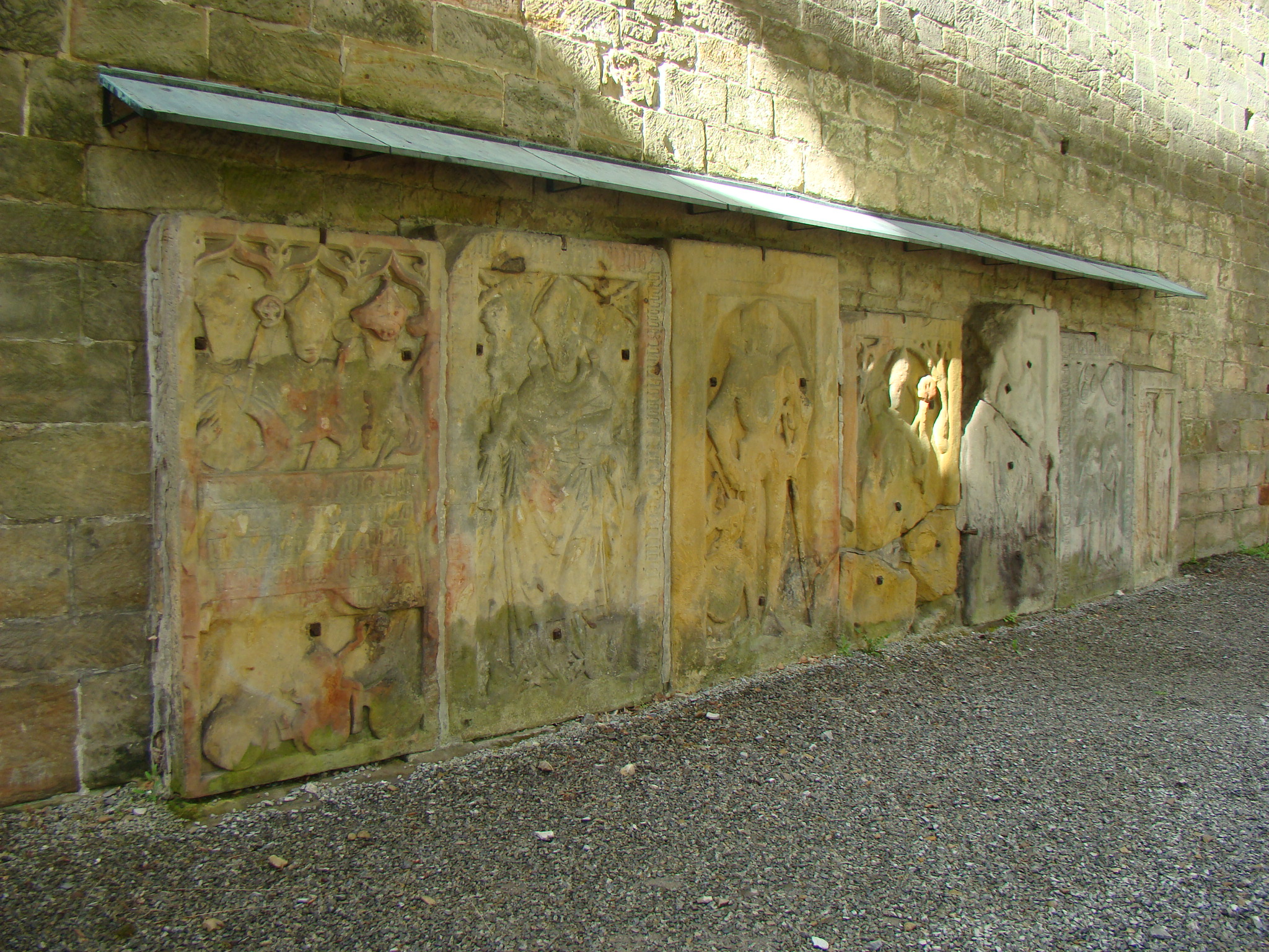 Kloster Paulinzella